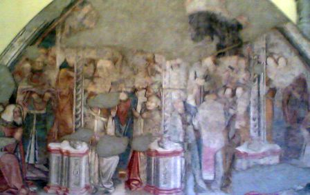 Affreschi, Santa Maria Incoronata, Napoli